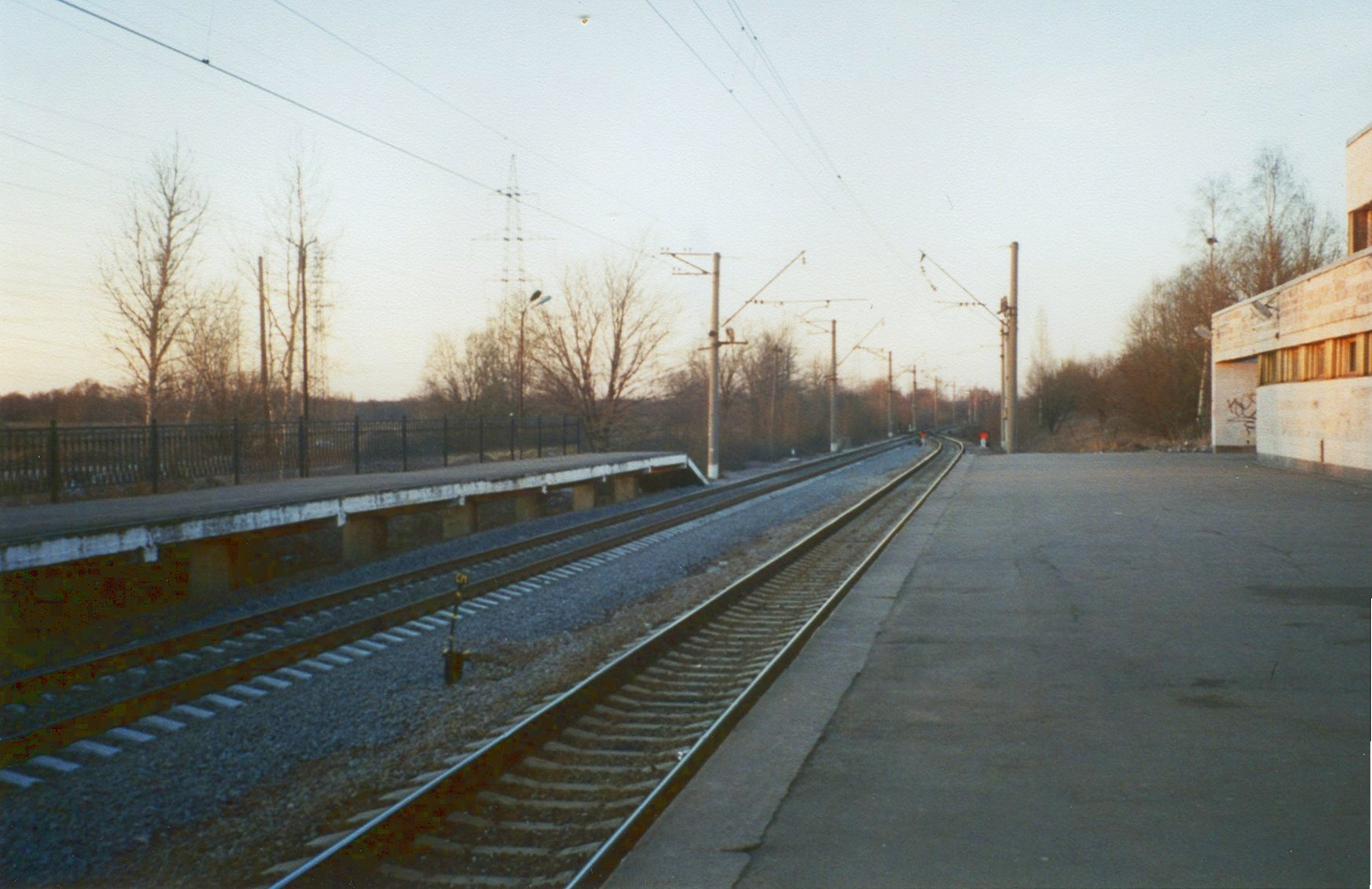 Платформа железнодорожной станции «Девяткино»